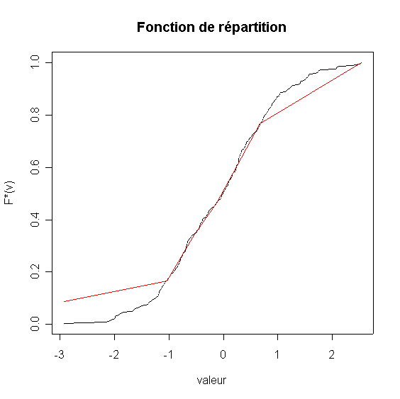 A simple repartition fct